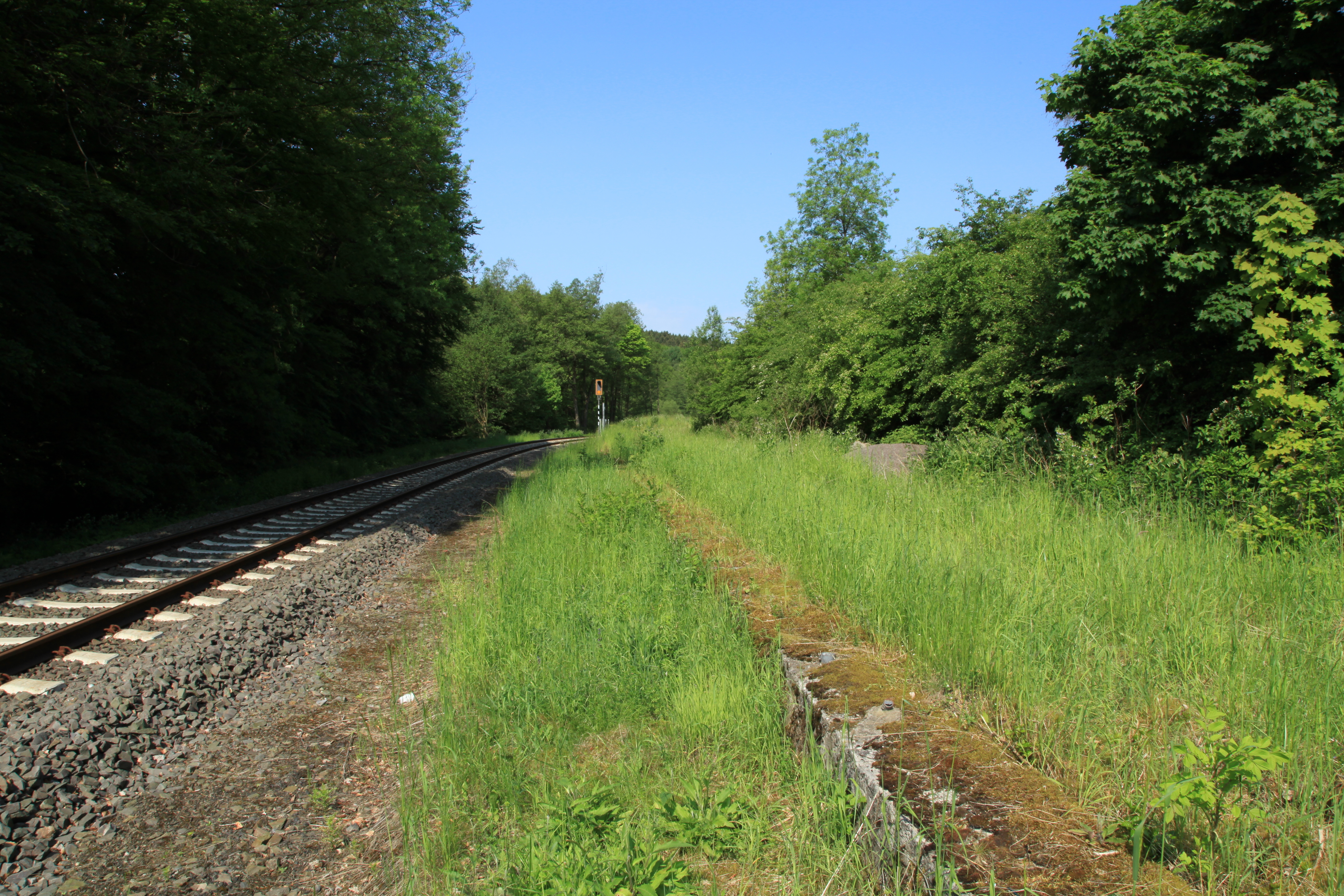 Ehemaliger Bahnhof Vollme, Hagener Straße in Kierspe-Vollme